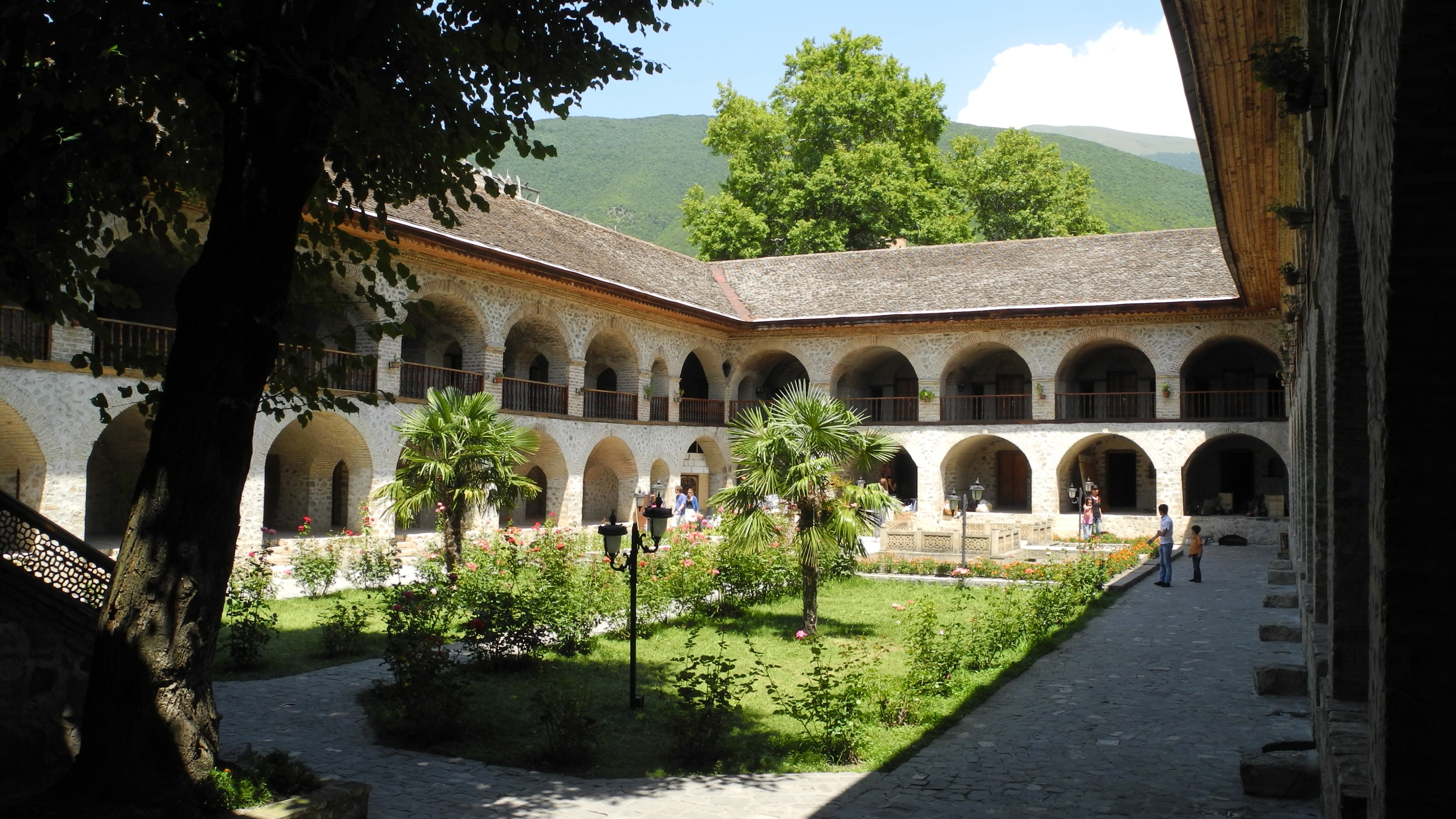 Sheki-Kish,Karavanserei Innenhof.JPG